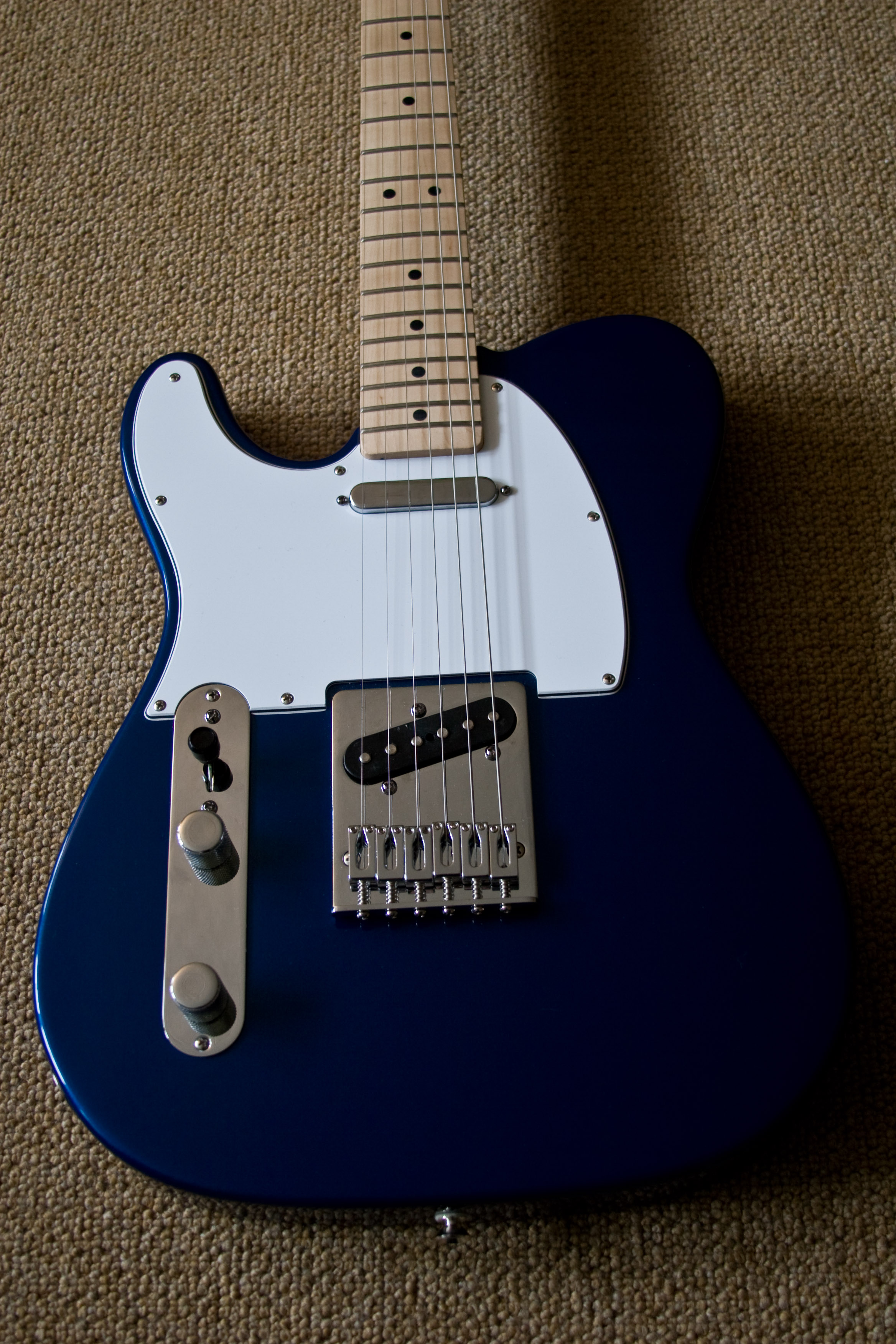 Fender Telecaster